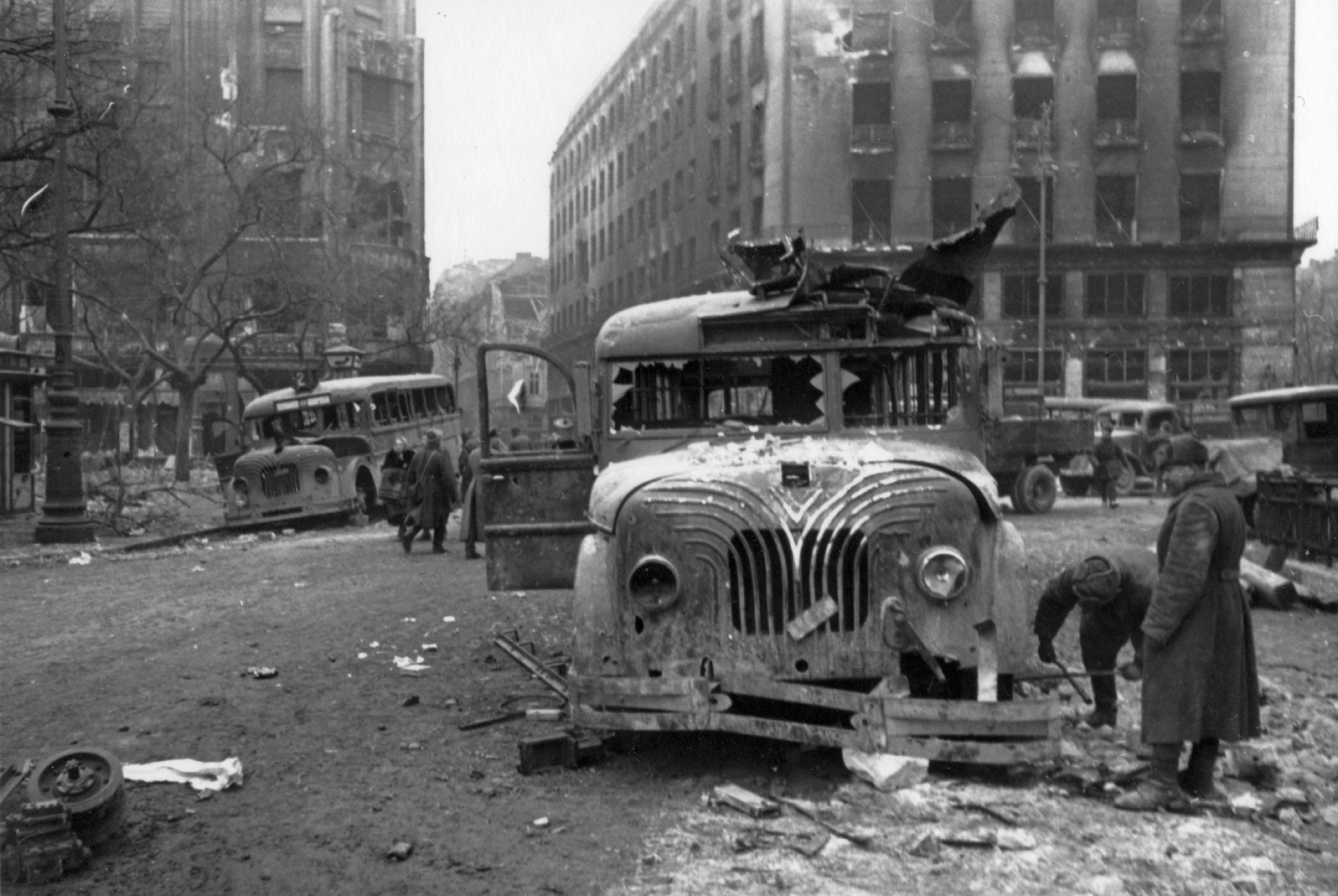 Deák Ferenc tér, szemben a Deák Ferenc utca. Location: Hungary, Budapest V. Tags: wreck, MÁVAG-brand, bus, Hungarian brand, Budapest Title: Deák Ferenc tér, szemben a Deák Ferenc utca.